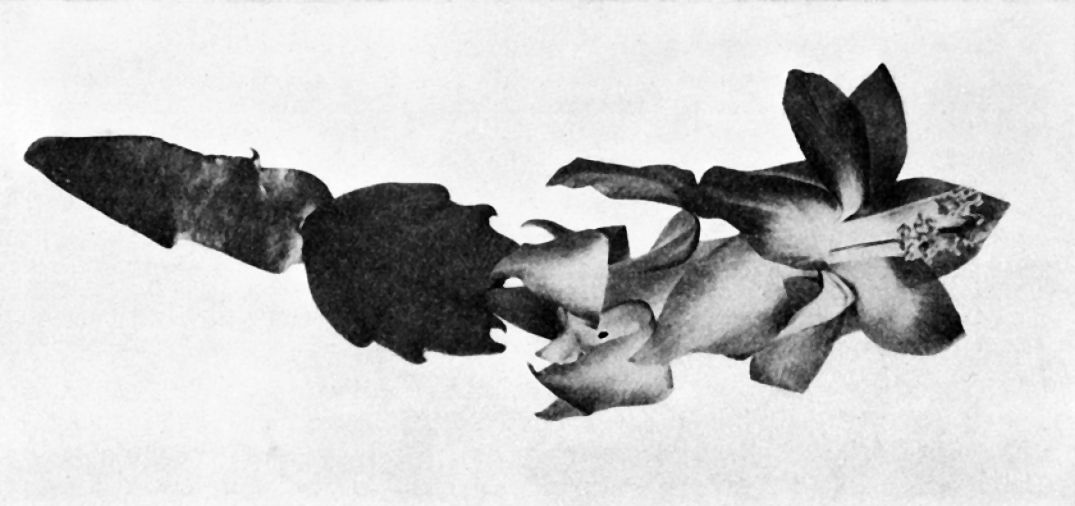 Schlumbergera truncata (Hylocereeae; Cactaceae; Planta) Nathaniel Lord Britton és Joseph Nelson Rose "The Cactaceae" c. könyvéből Zygocactus truncatus néven